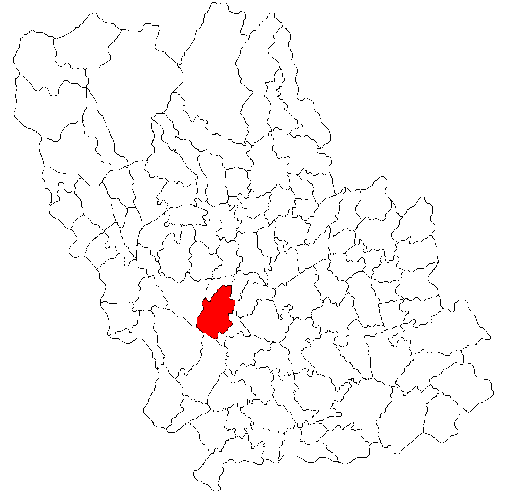 Categorie:Hărţi ale judeţului Prahova